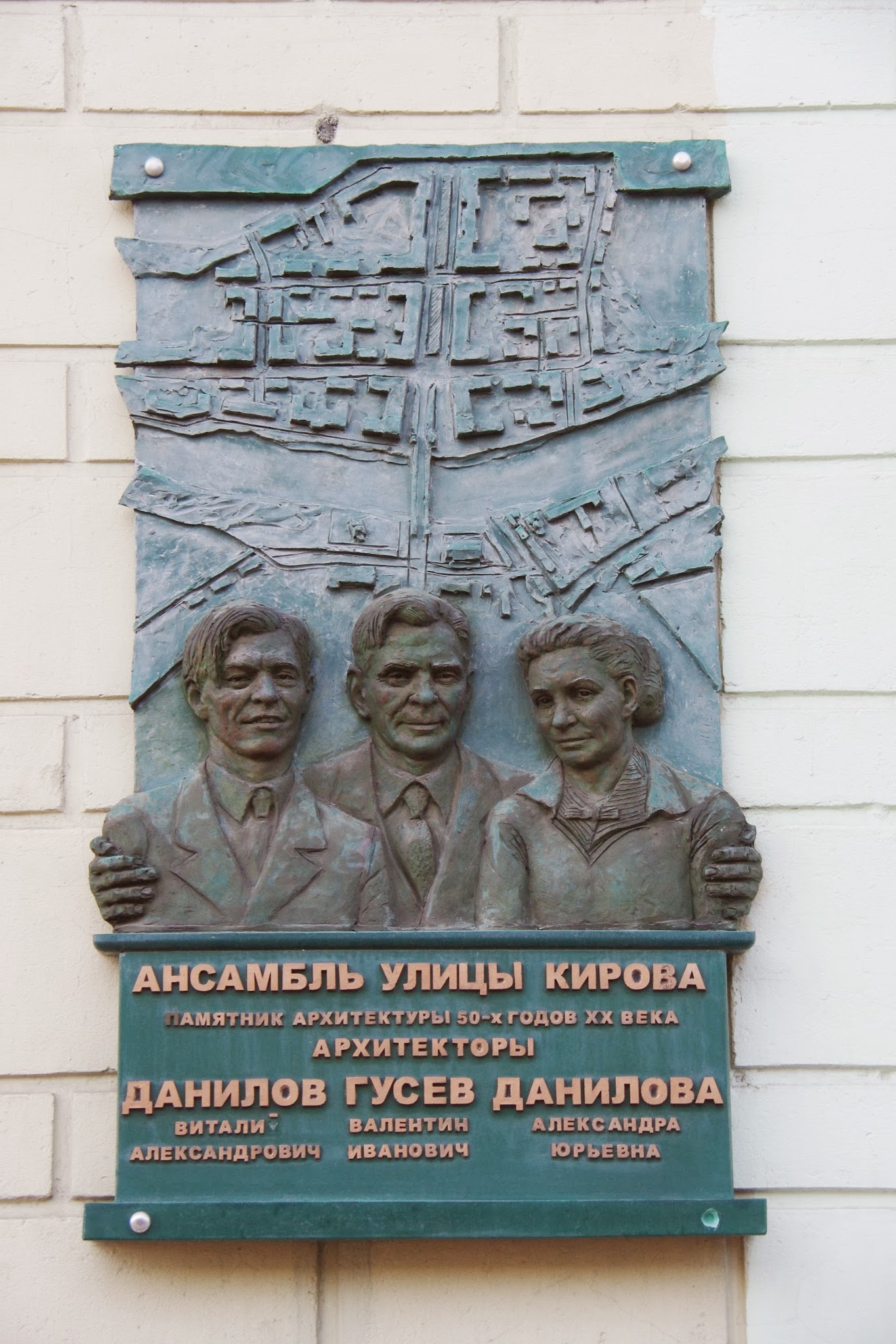 Čyhunačny rajon, Viciebsk, Belarus